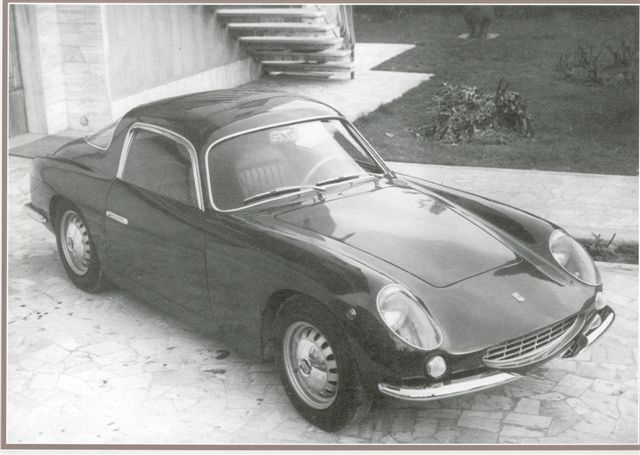 Bandini 1000 GT tratta dal libro Bandini